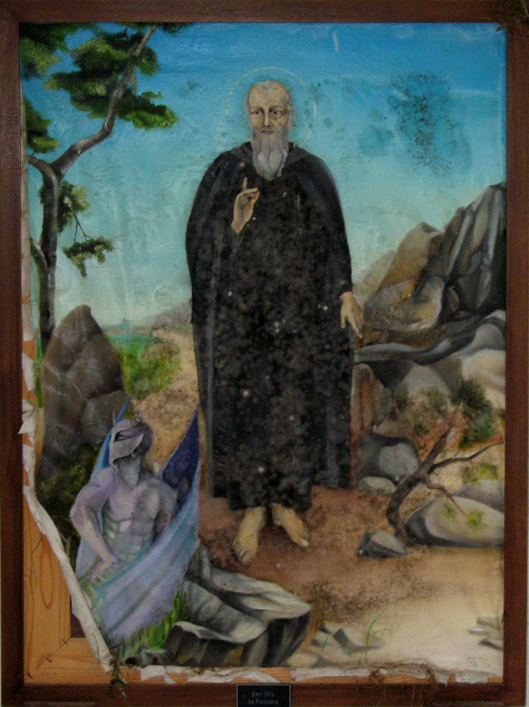 Ritratto di San Nilo da Rossano presso il Santuario di San Nicodemo, Mammola (RC)